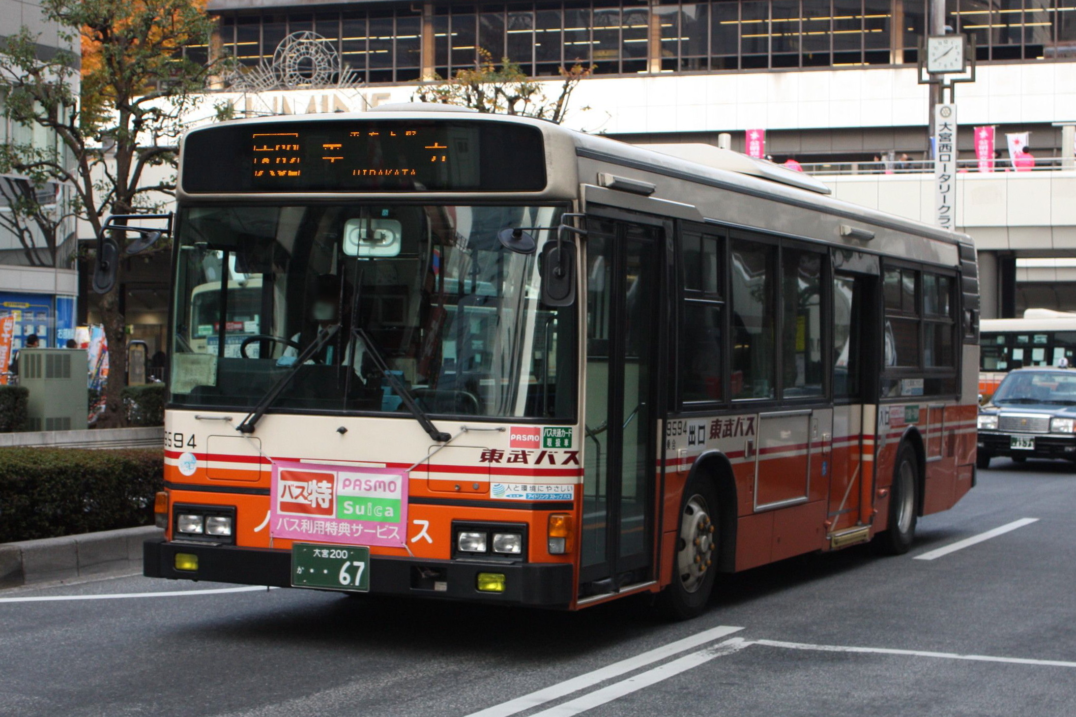 東武バスウエスト上尾営業所 車番:9594 大宮駅西口にて